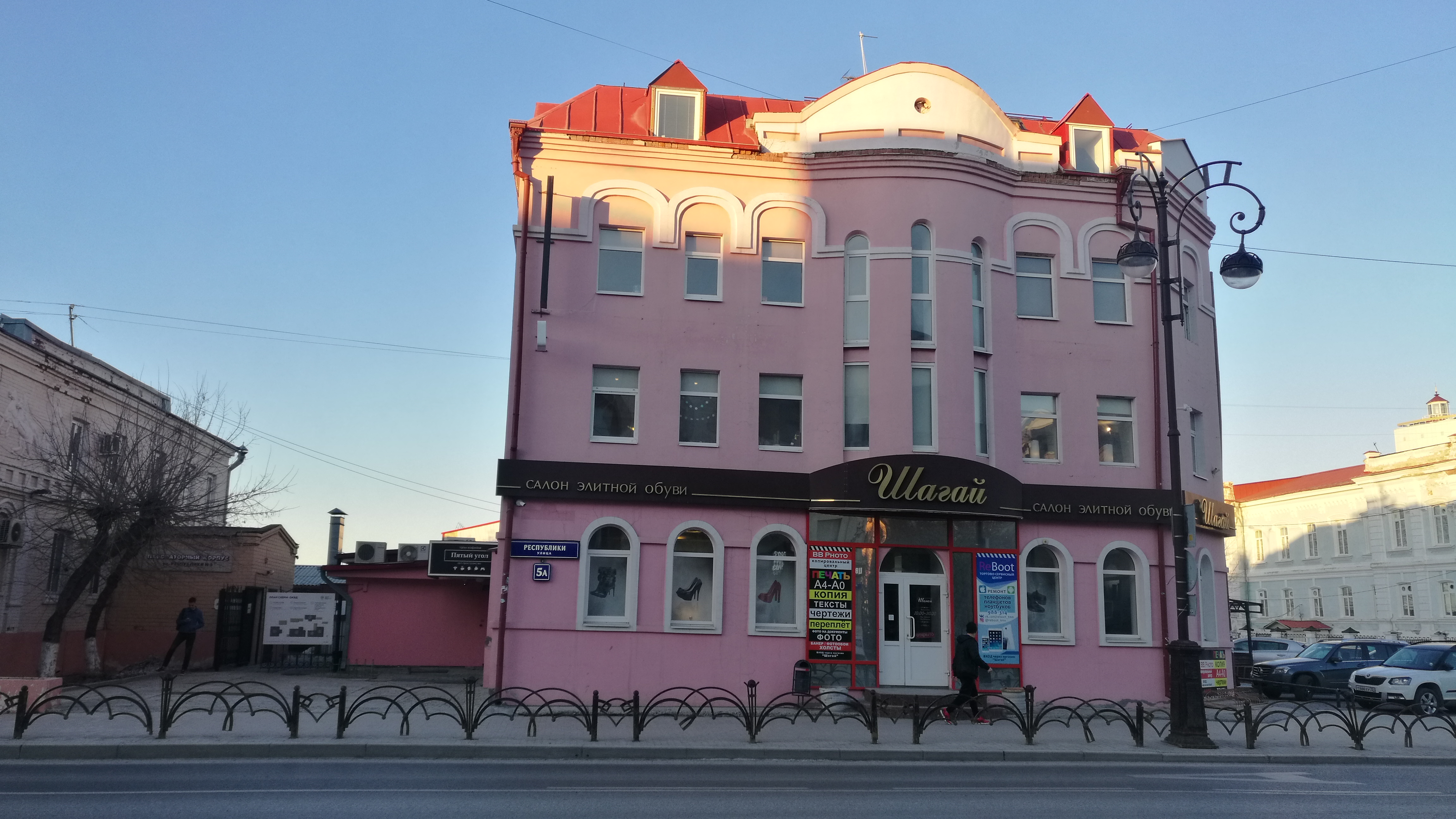 Domo N 5a en strato Respubliko. Tjumeno, Rusio.